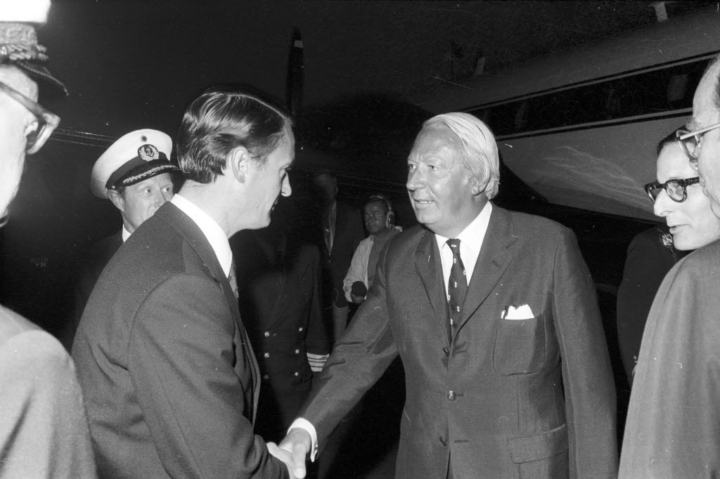 Heath (rechts) wird von Dr. Uwe Barschel (MdL CDU) begrüßt, vermutlich in dessen Funktion als Regierungsbeauftragter für Jugend und Sport.